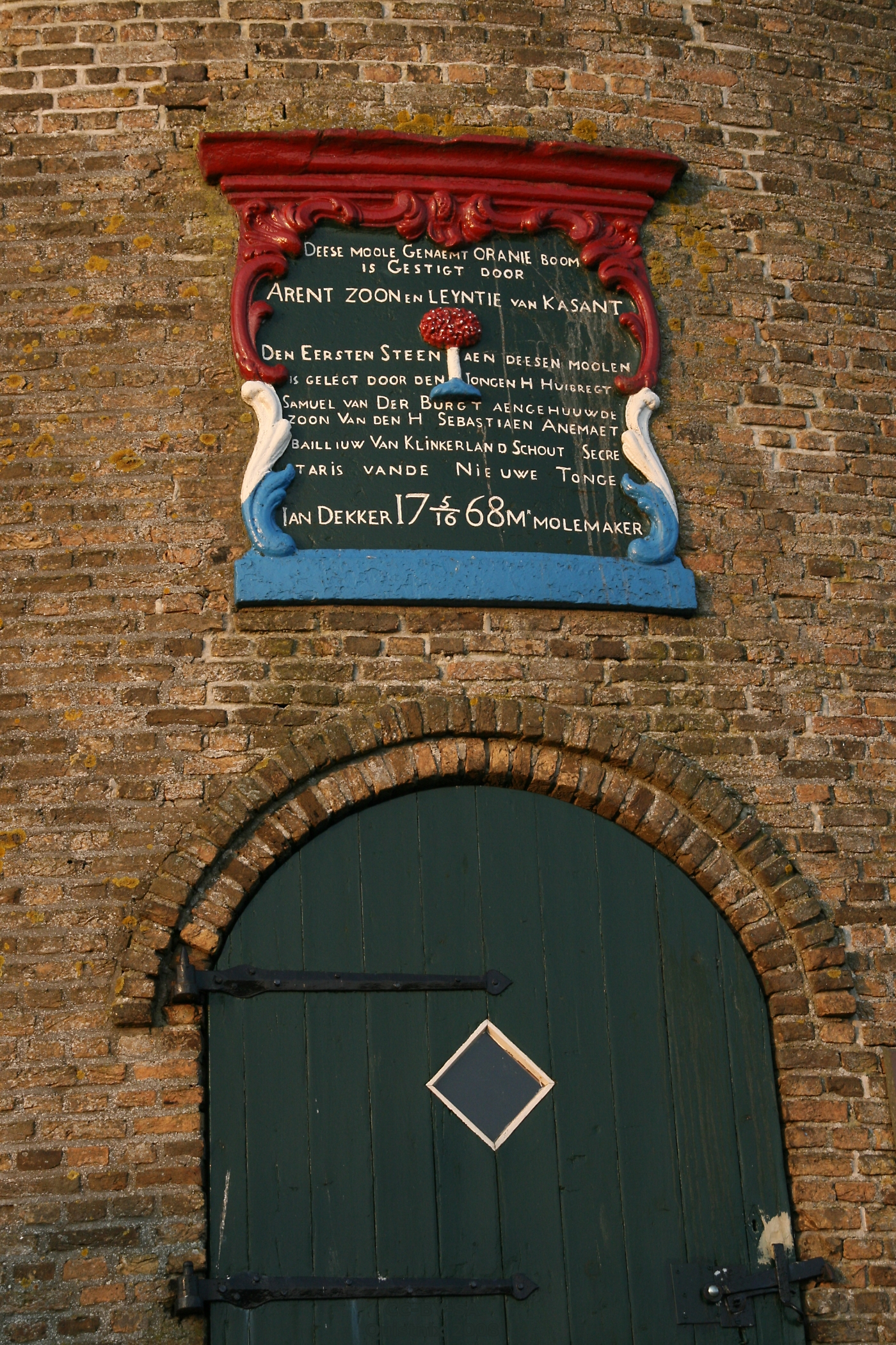 Nieuwe-Tonge: korenmolen D'Oranjeboom - gedenksteen